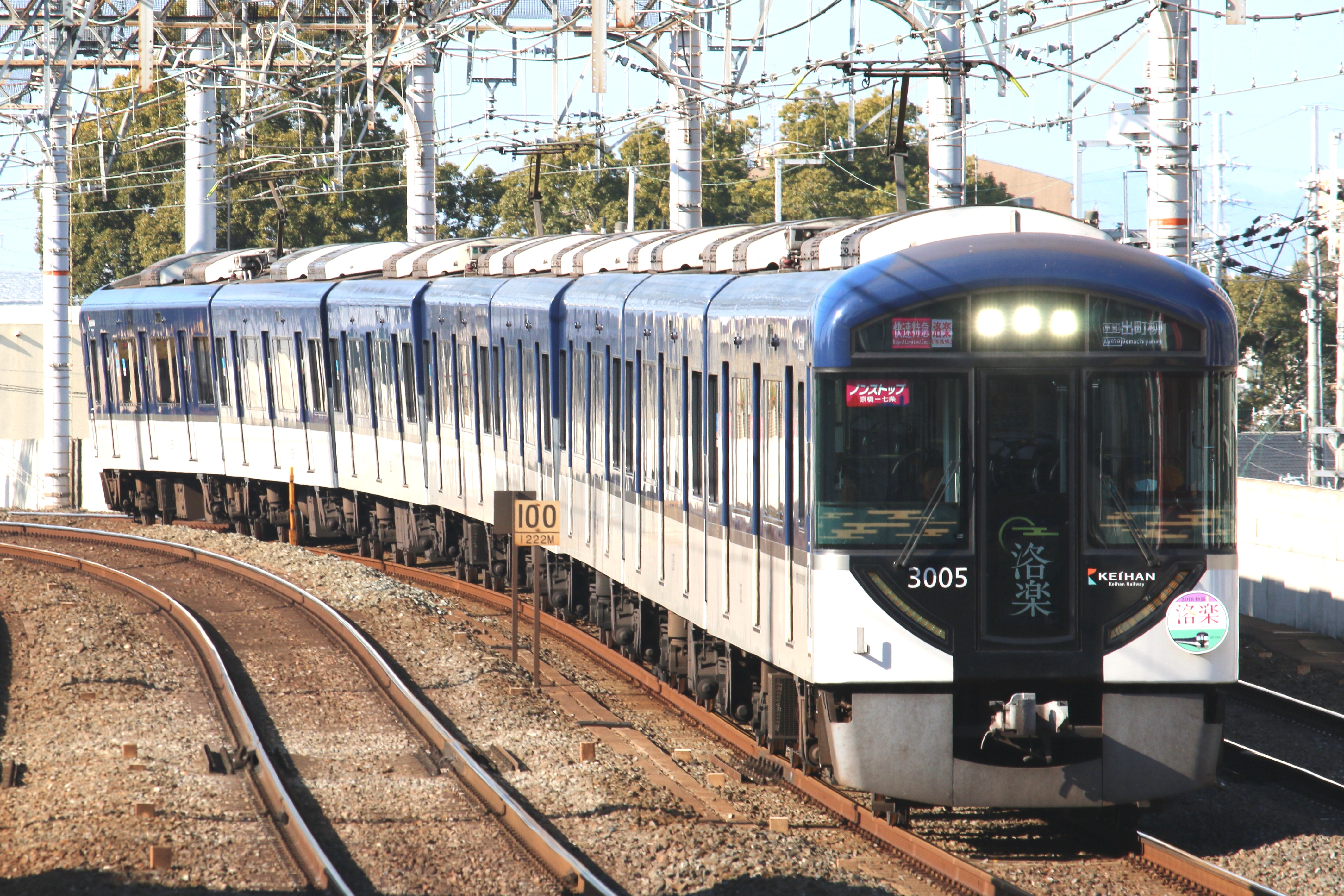 京阪3000系 快速特急洛楽 大和田駅